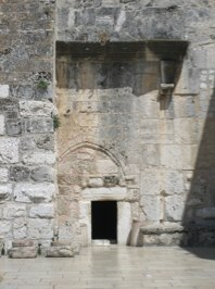 The Church of the Nativity in Bethlehem. Portal. / Crkva Rođenja Isusova u Betlehemu. Portal (zazidani portali iz 6. i 12. st., te mali prolaz iz turskog doba.